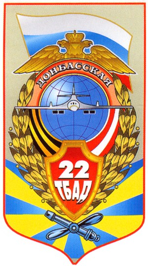 Эмблема 22 тяжелой бомбардировочной авиационной дивизии